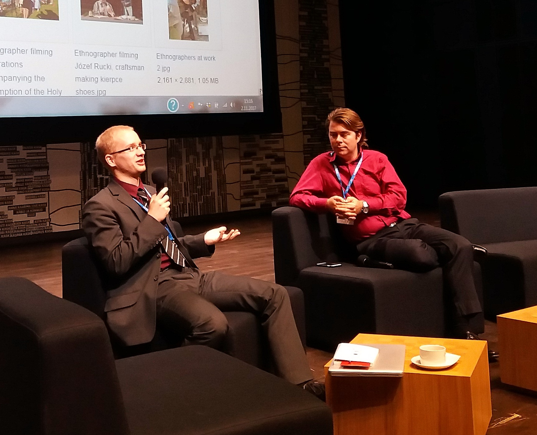 Ivo räägib ja Liam kuulab